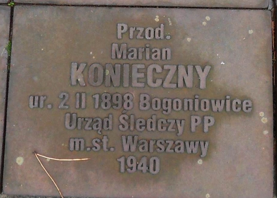 Źródło